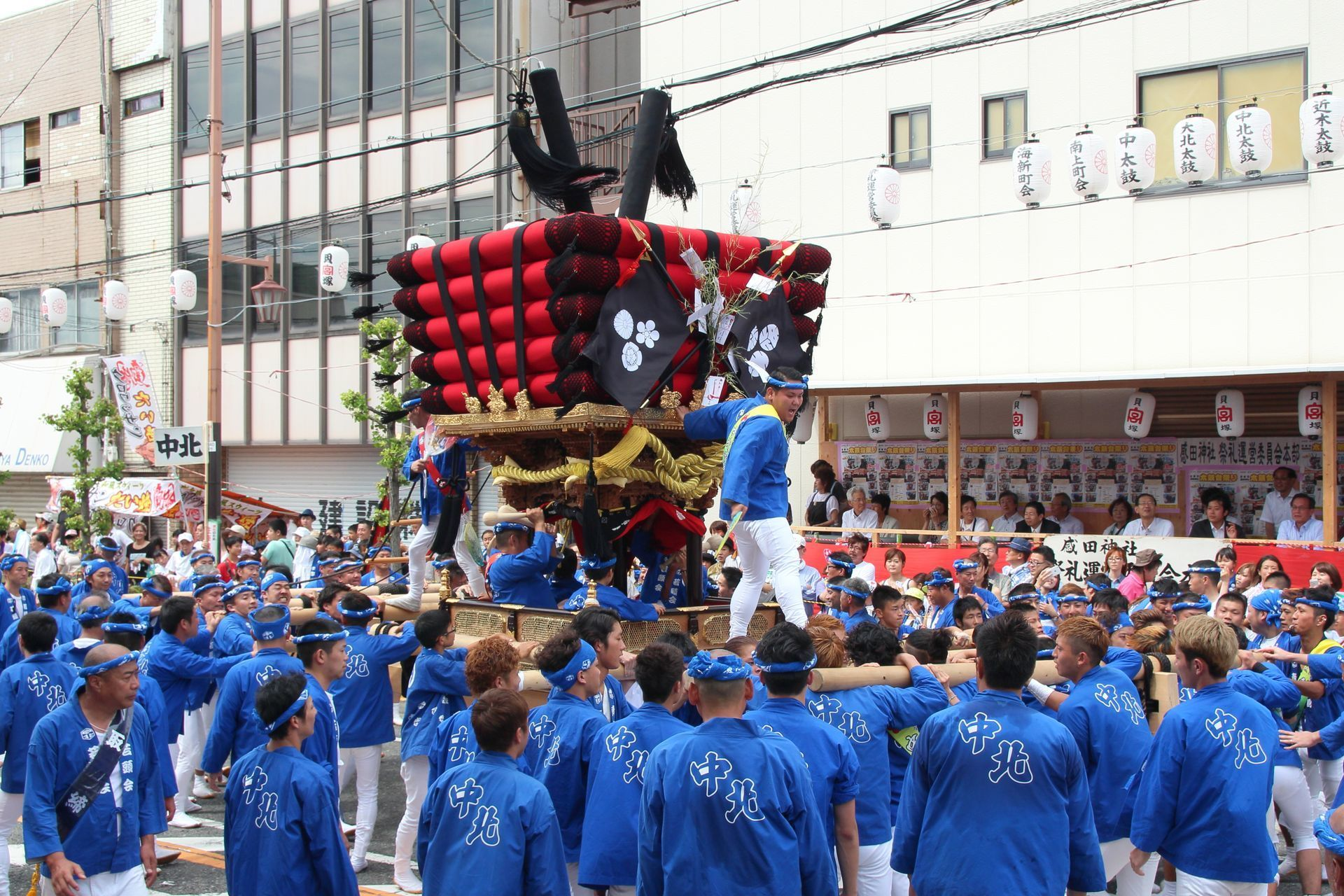 本宮かきあいの中北太鼓